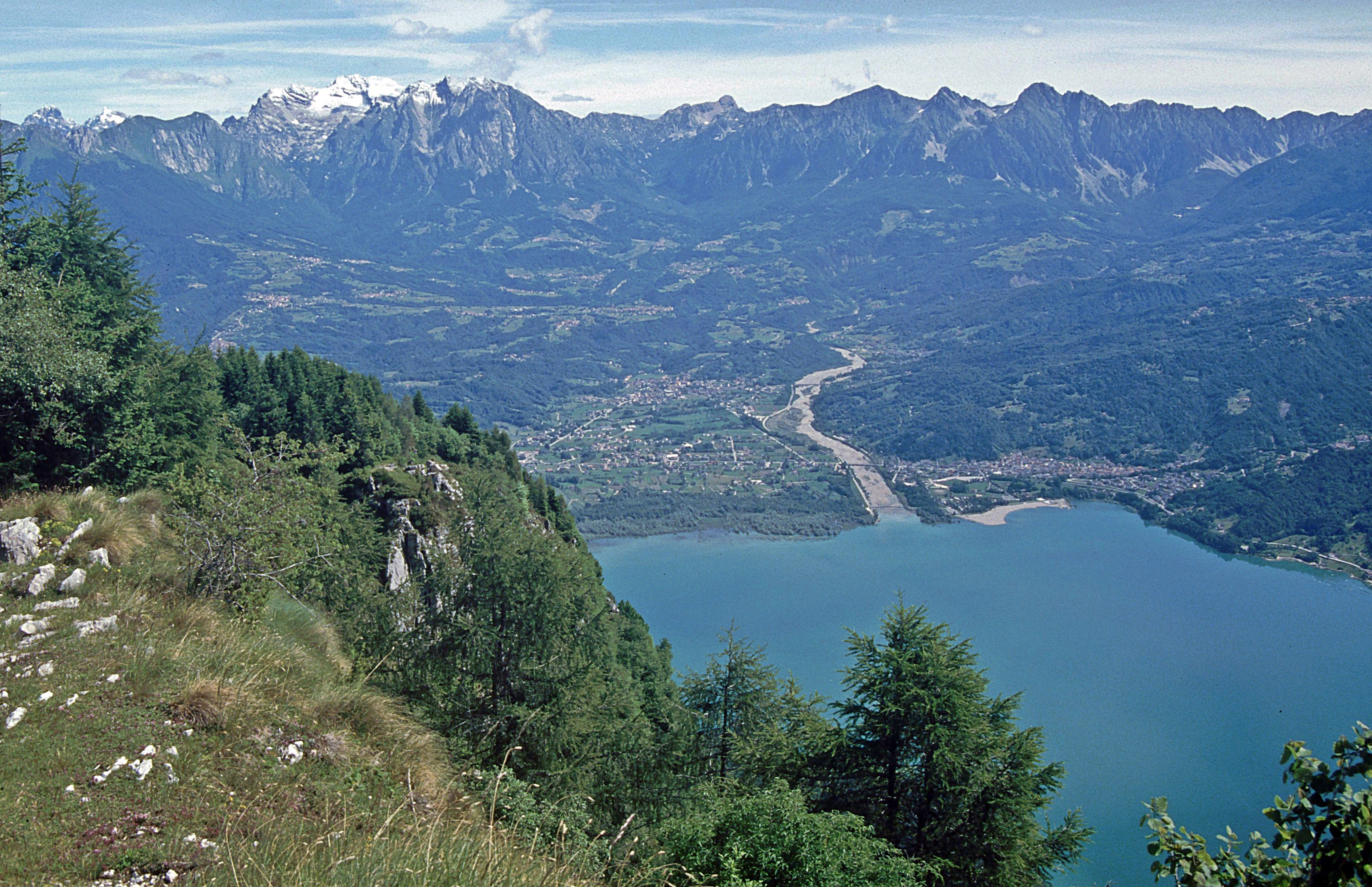 Lago di Santa Croce vom Nevegal